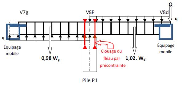 Viaduc de La Barricade - Stabilité de fléau - Schéma sur la pile P1